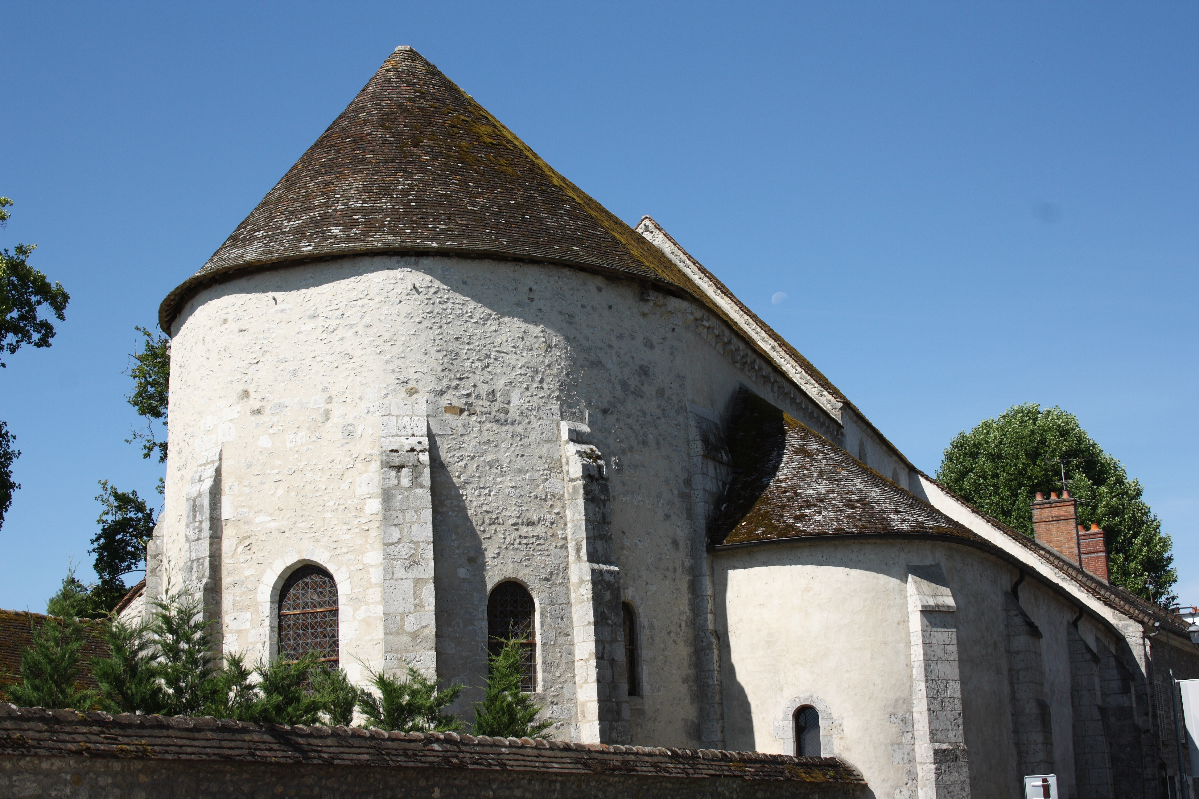 Kapelle Saint-Pierre de Pontloup in Moret-sur-Loing im Département Seine-et-Marne (Île-de-France)